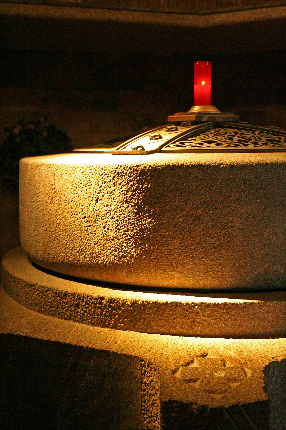 Sacrario del Pordoi